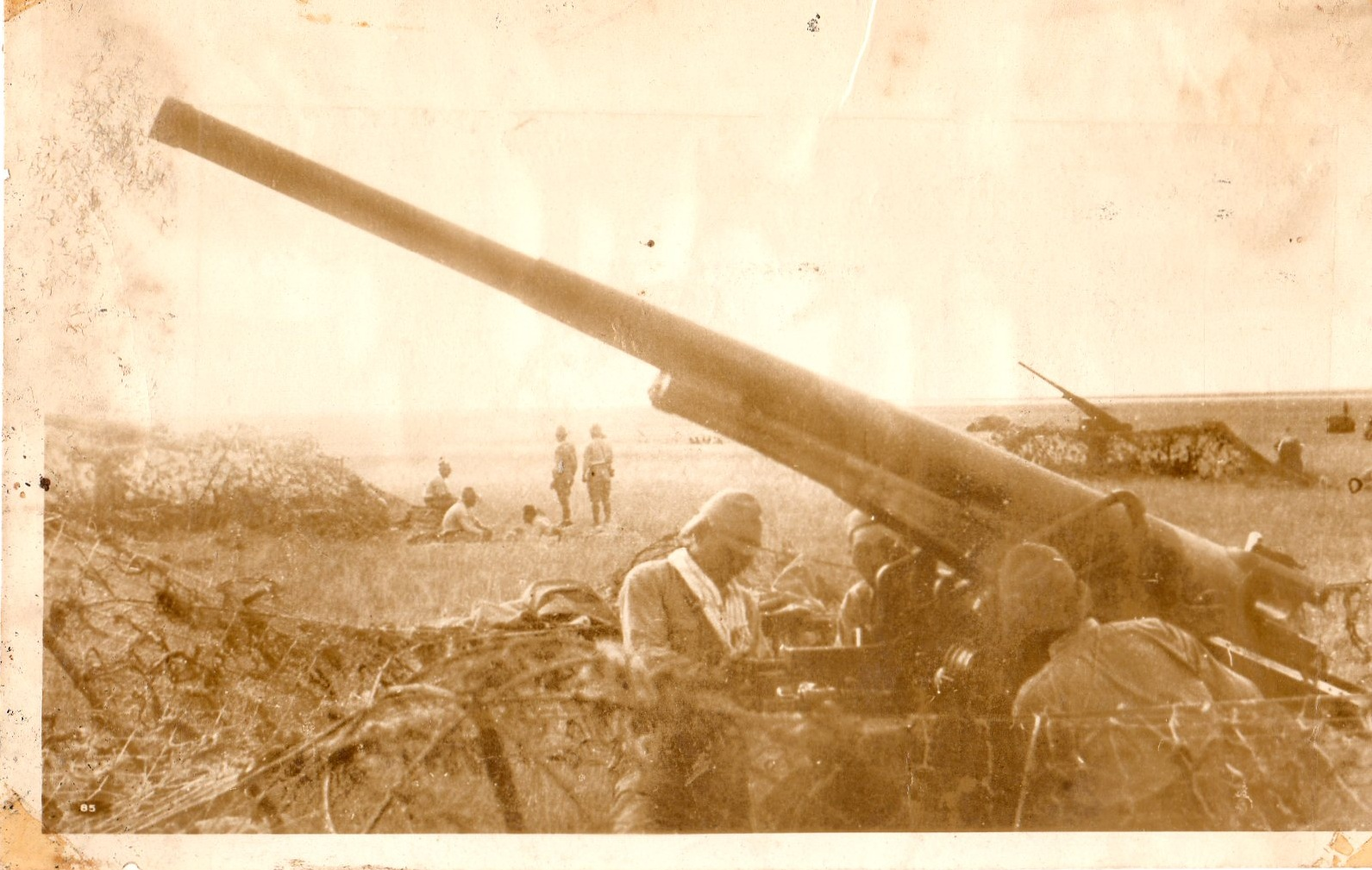 昭和15年 満州 齋藤傳義蔵